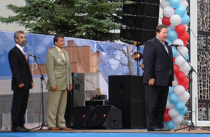 Семьдесят лет городу Северодвинск. Концерт. Слева: Мэр Северодвинска Беляев, Александр Николаевич В середине: Председатель совета депутатов Северодвинска В. Иванов Справа: губернатор Архангельской области Михальчук, Илья Филиппович